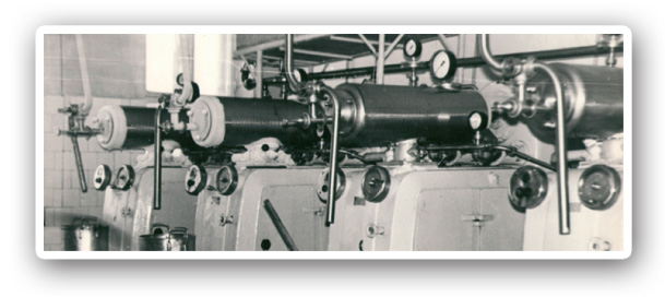 Выпуск первой продукции